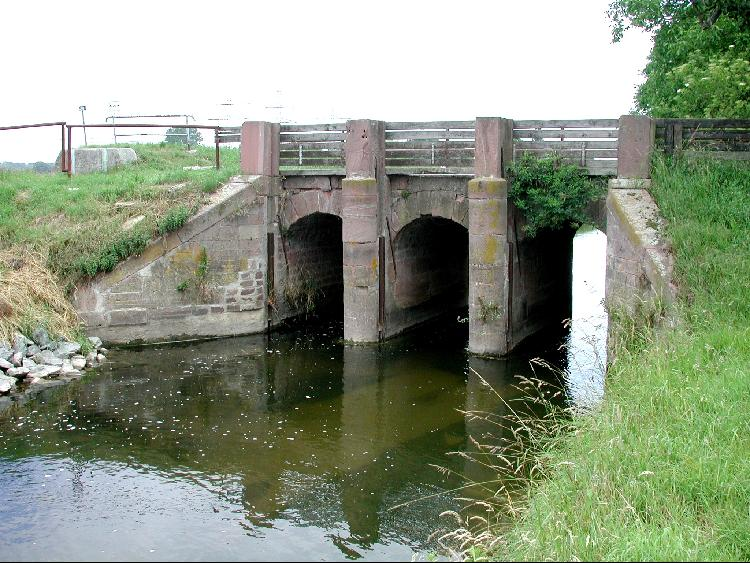 Die zwischen Hockenheim und Ketsch über den Kraichbach führende Kraichbachbrücke mit ihren drei Schleusentoren wurde bereits im Jahr 1843 durch den damaligen Großherzog Leopold von Baden errichtet. Das einst für die Wiesenwässerung genutzte Bauwerk ist seit den 1960er Jahren funktionslos. Foto: Michael Linnenbach 11:31, 23. Mär 2006 (CET) (Aufnahme: 2004)